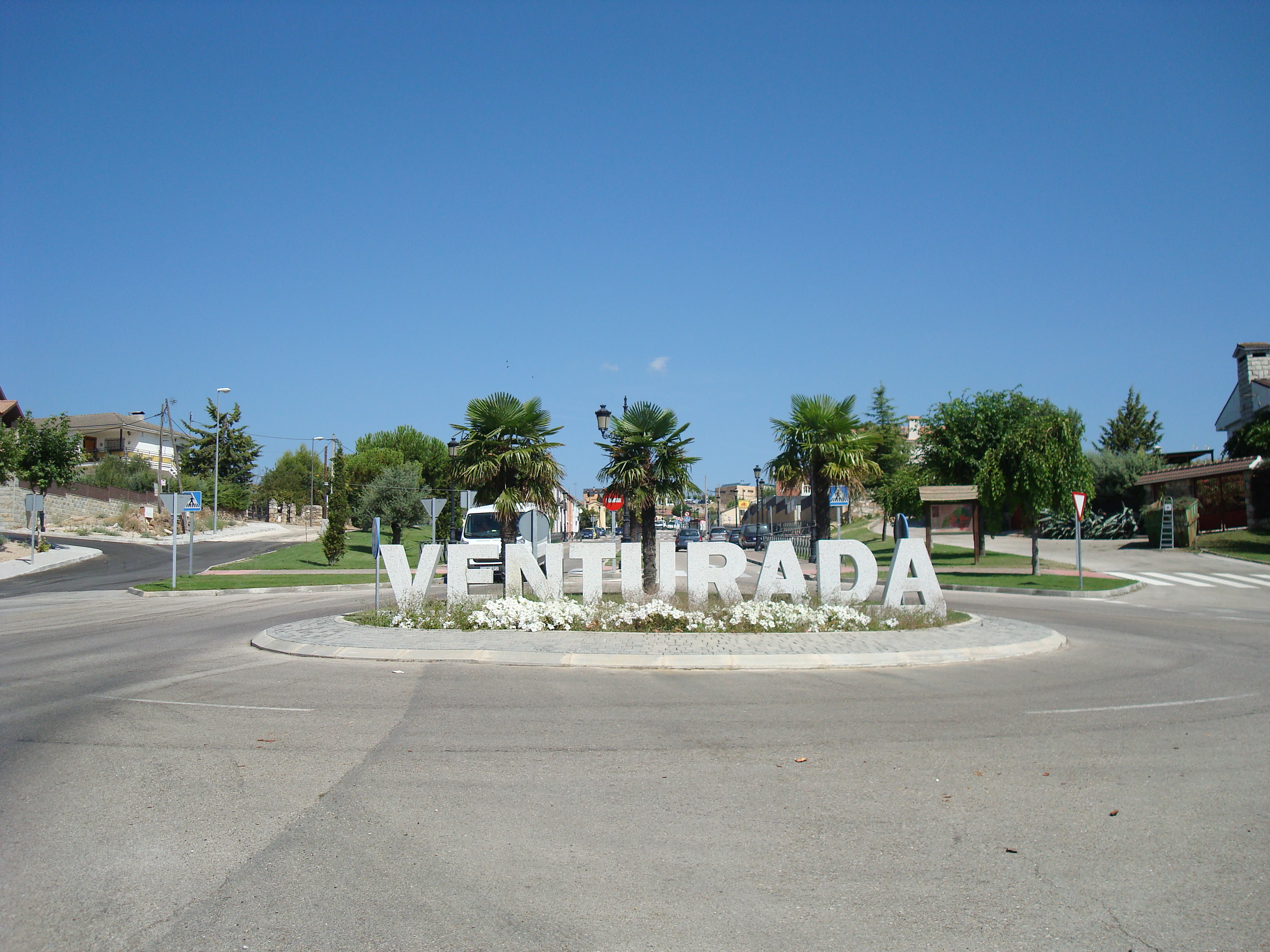 Bulevar de Venturada